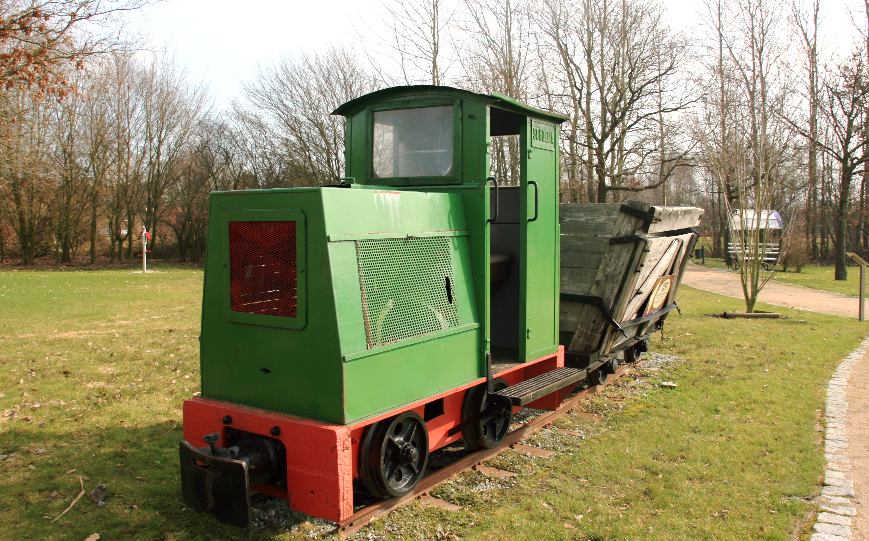 Torfbahn Wiesmoor